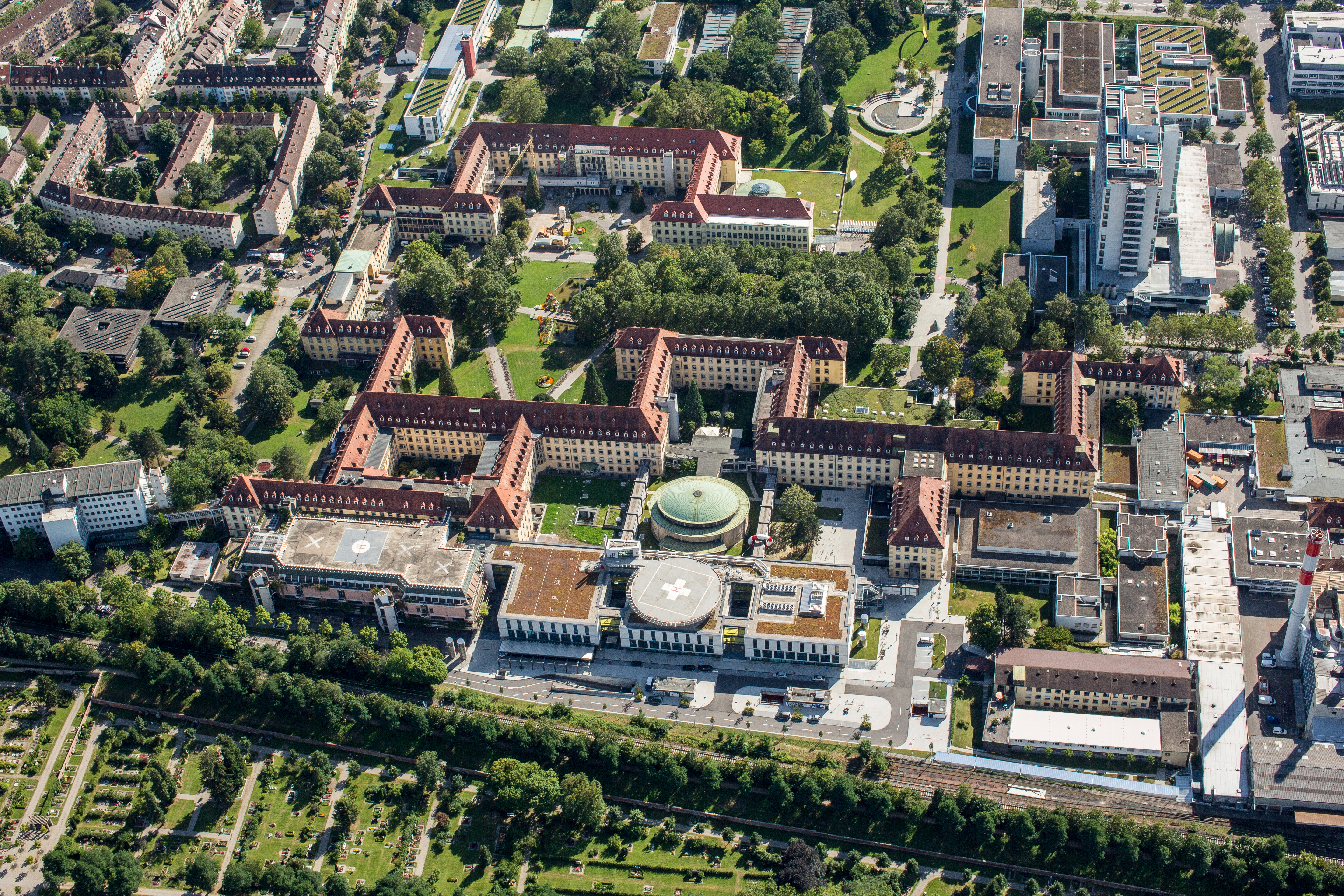 Luftbild des Universitätsklinikums Freiburg